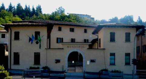 Fotografia del Municipio di Odolo scattata dalla antistante Piazza Alessio Pasini